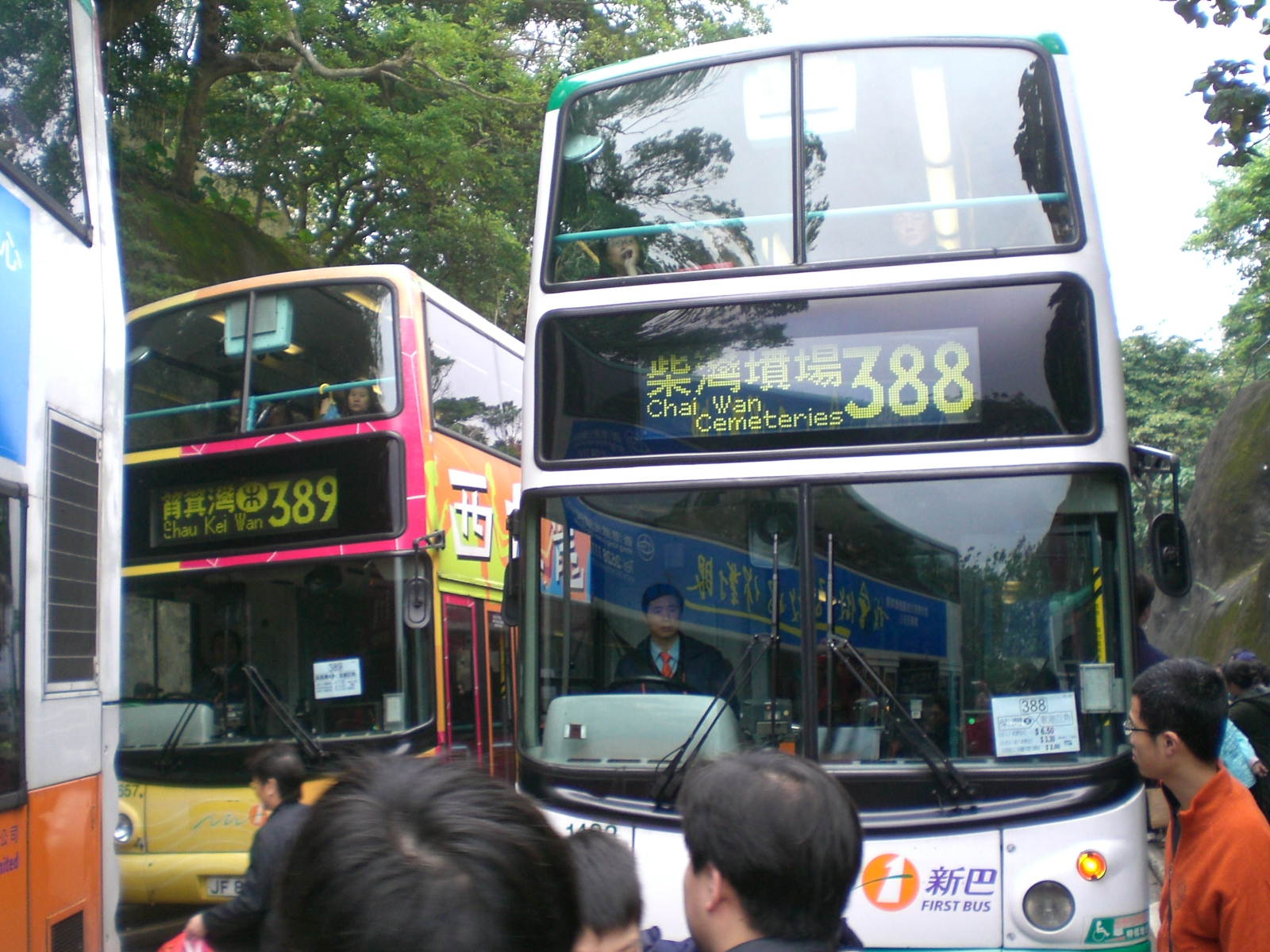 哥連臣角 Cape Collinson（或寫作歌連臣角，古稱黑角頭）是zh:香港的一個地方，位於zh:香港島東部，柴灣及zh:小西灣以南，大浪灣 以北的地方。 Photo by me.